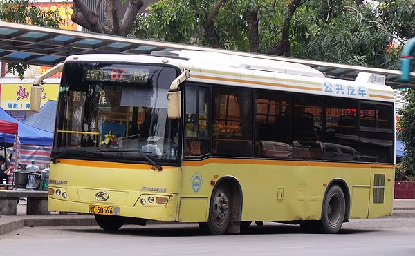 珠海公交67路线